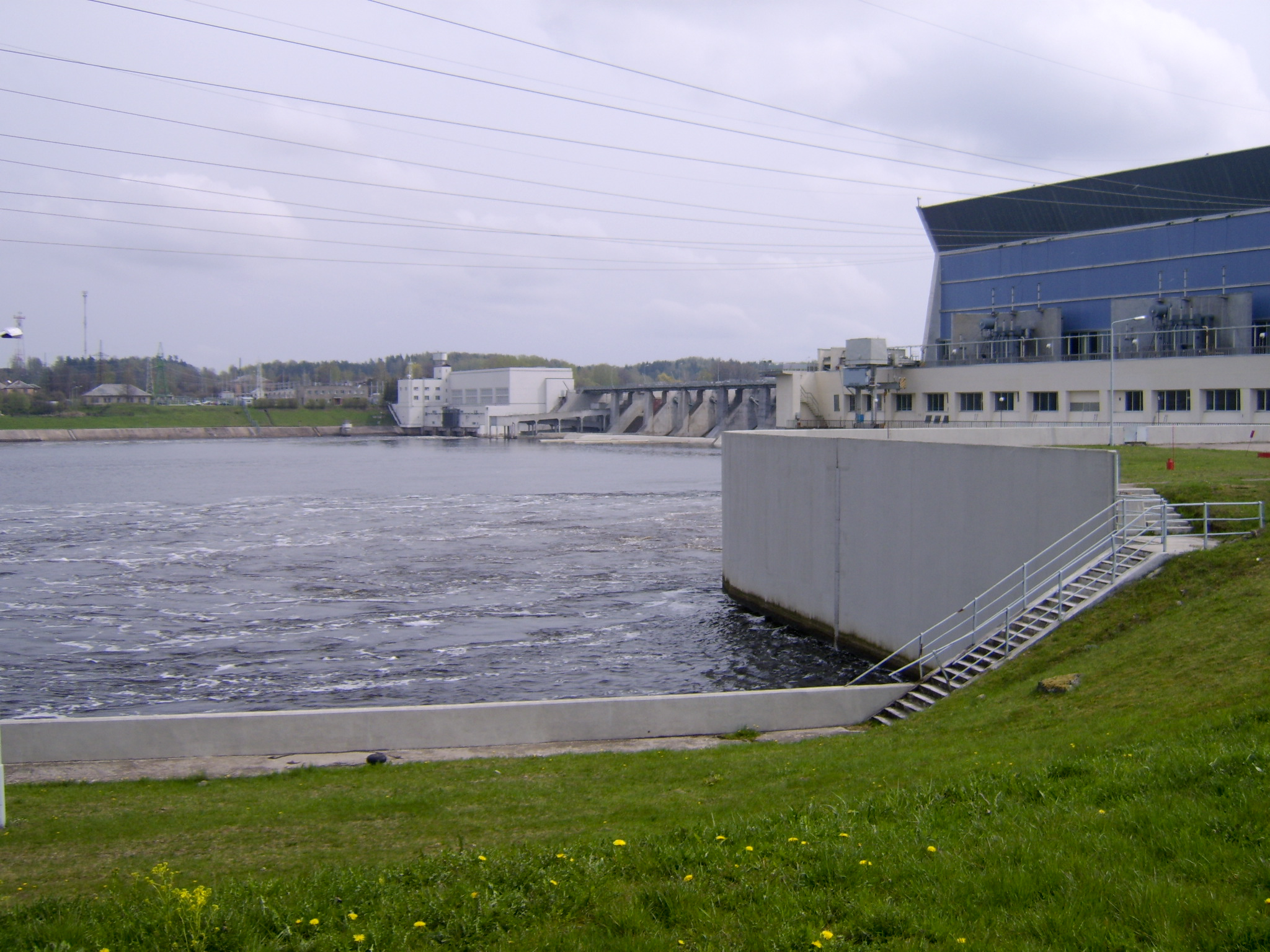 Keguma HES